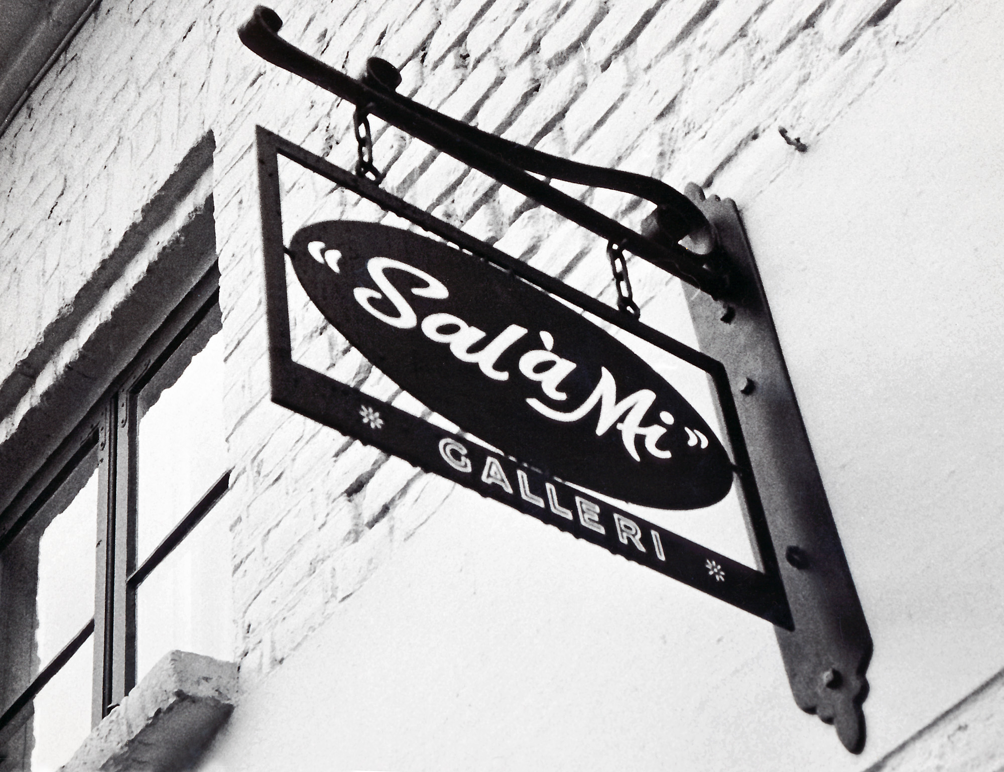 Bratlie hadde i noen år på 1980-tallet galleri for visning og salg av egen kunst. Lokalet i Voldportgaten var tidligere et pølsemakeri som han pusset opp selv. Navnet kom til som et ordspill til tidligere virksomhet og til ny bruk (min egen sal). Foto: Espen Bratlie.